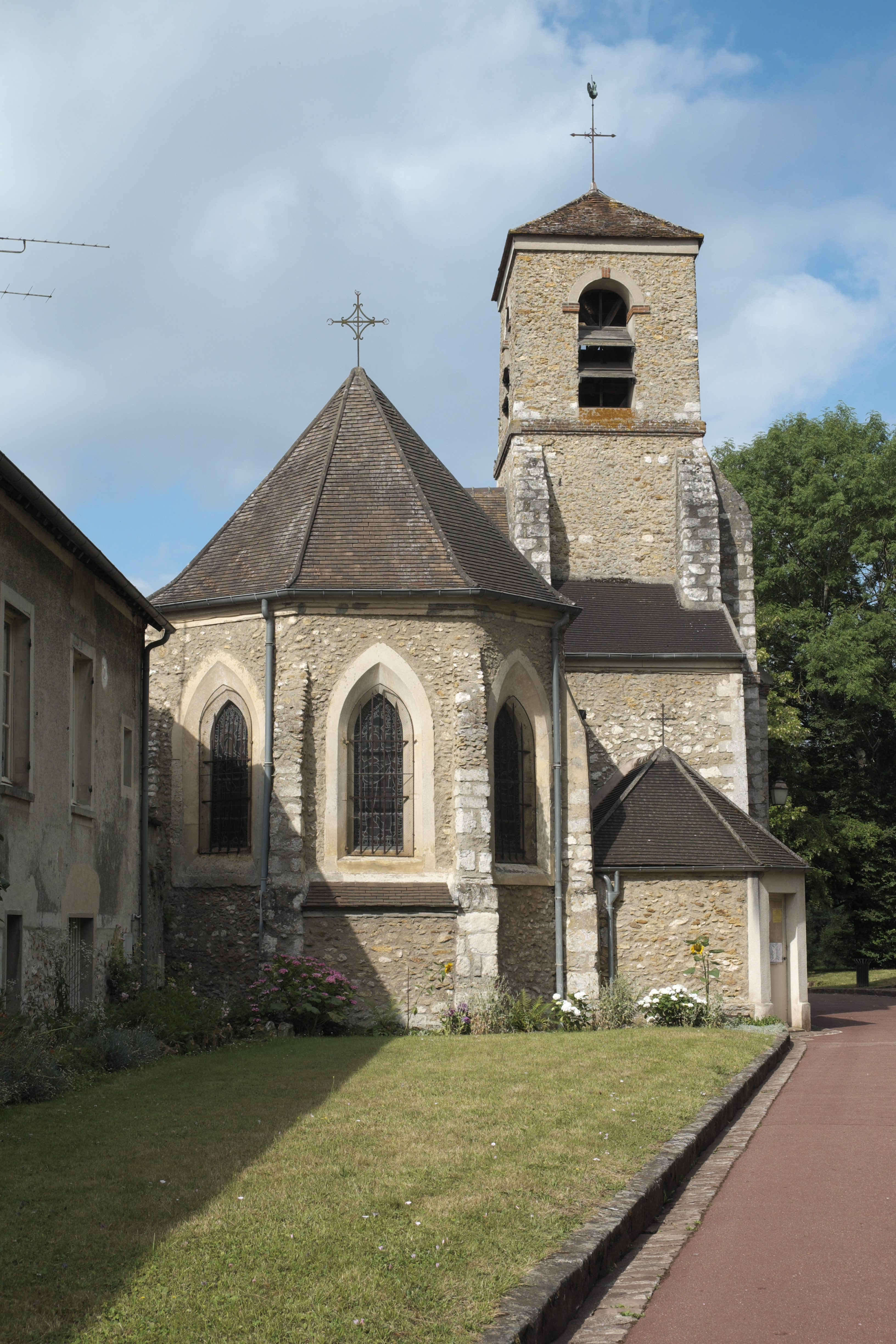 Katholische Kirche Saint-Pierre in Boussy-Saint-Antoine im Département Essonne (Île-de-France/Frankreich)